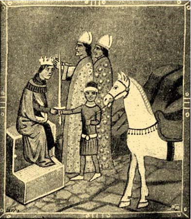 Gejza II.a jeho mladší bratr Ladislav II.